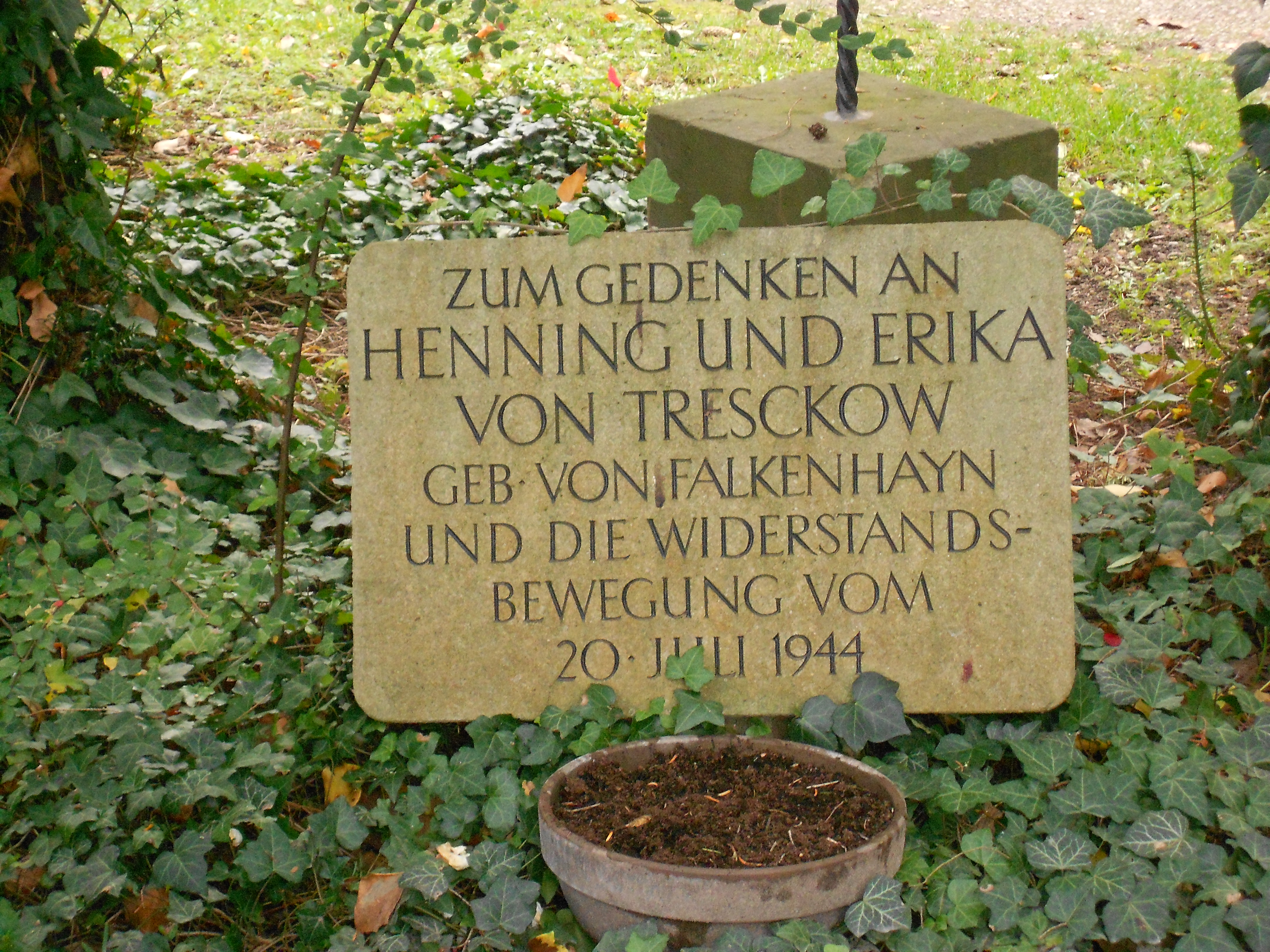 Gednekstein für Henning von Tresckow und seine Frau auf dem Bornstedter Friedhof, Potsdam